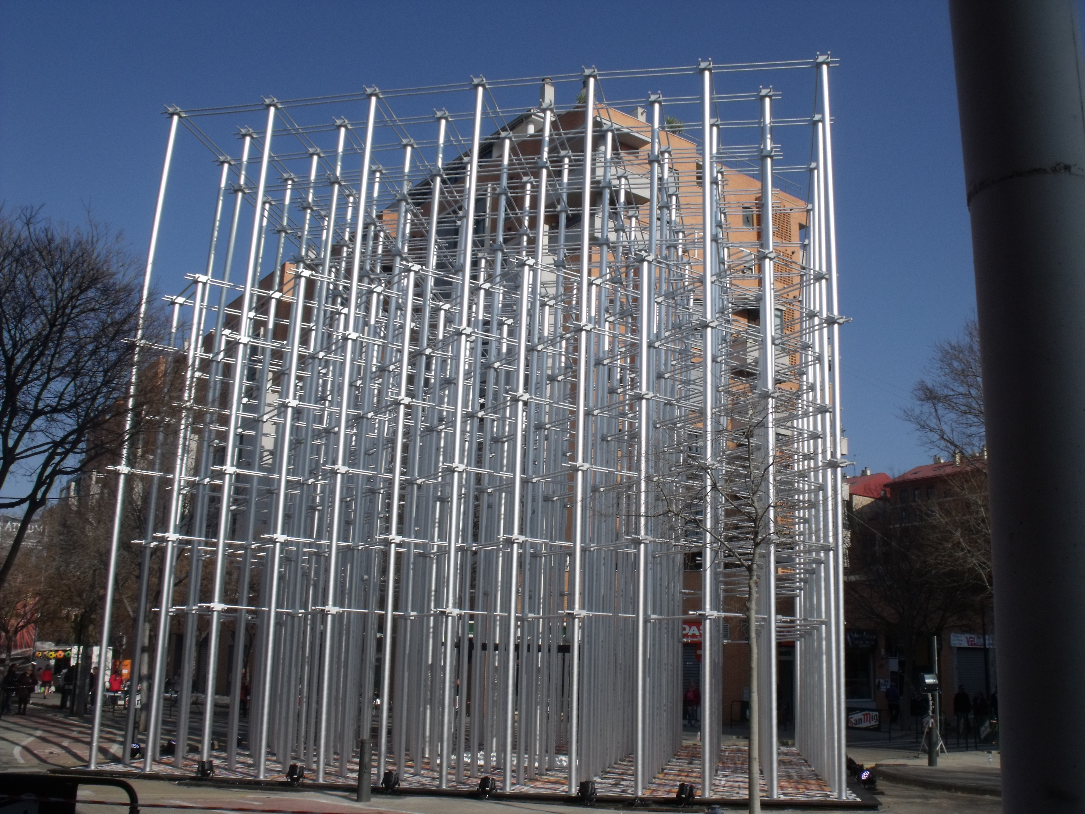 Vista general de la falla